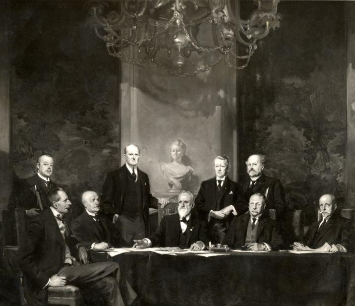 Kabinet Cort van der Linden (1913-1918) poseert in de Tweede Kamer. Reproductie van een schilderij van Piet van der Hem, jaartal onbekend.